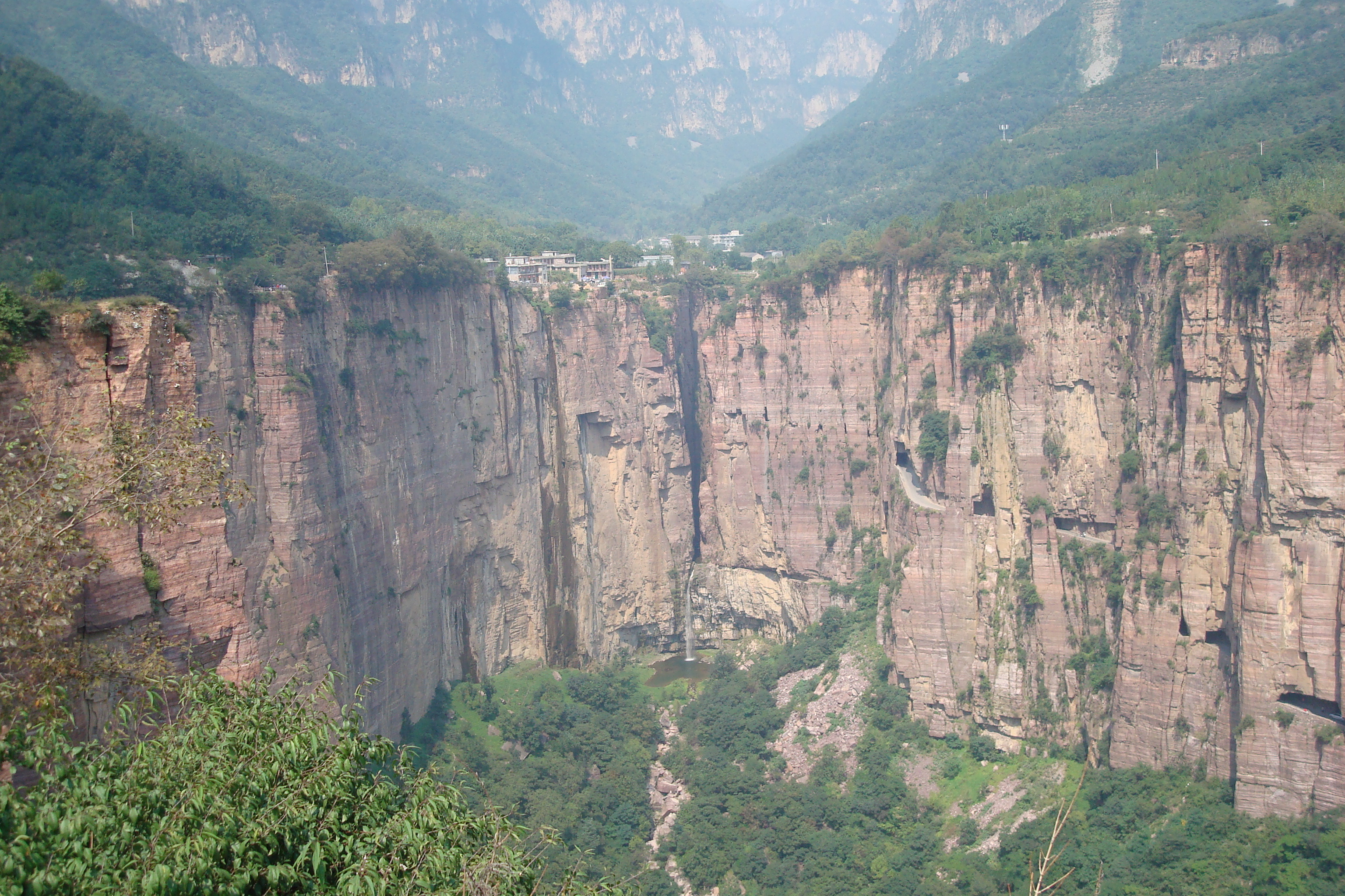 绝壁长廊是郭亮人在绝壁上凿出的出山路